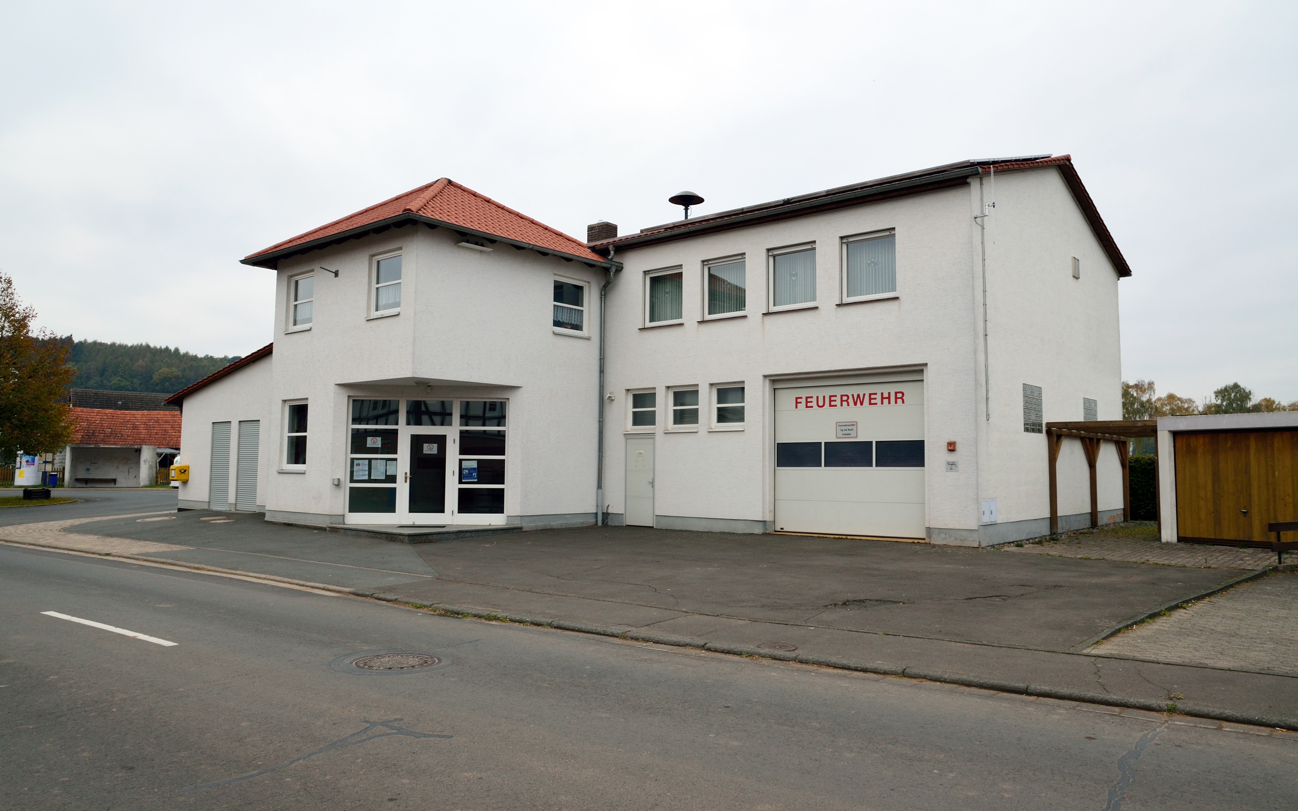 Feuerwehr Halsdorf (Wohratal), Hauptstraße 13